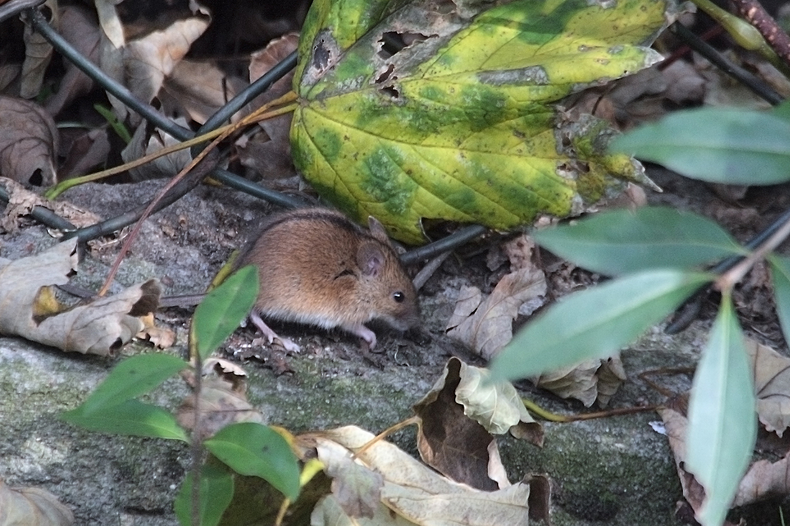 Mysz polna, Łódź(Polska)